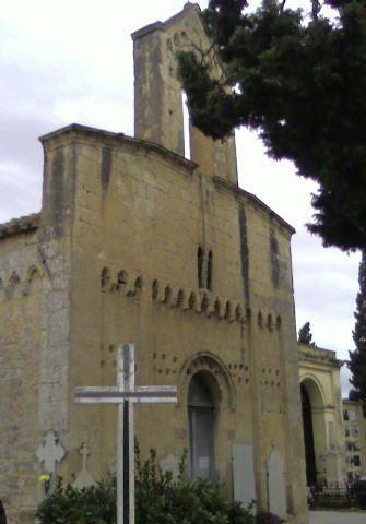 Immagine personale, scattata il 15 dicembre 2007 con cellulare Samsung SGH_Z230, raffigurante la Chiesa di San Pietro Ponte a Quartu Sant'Elena.